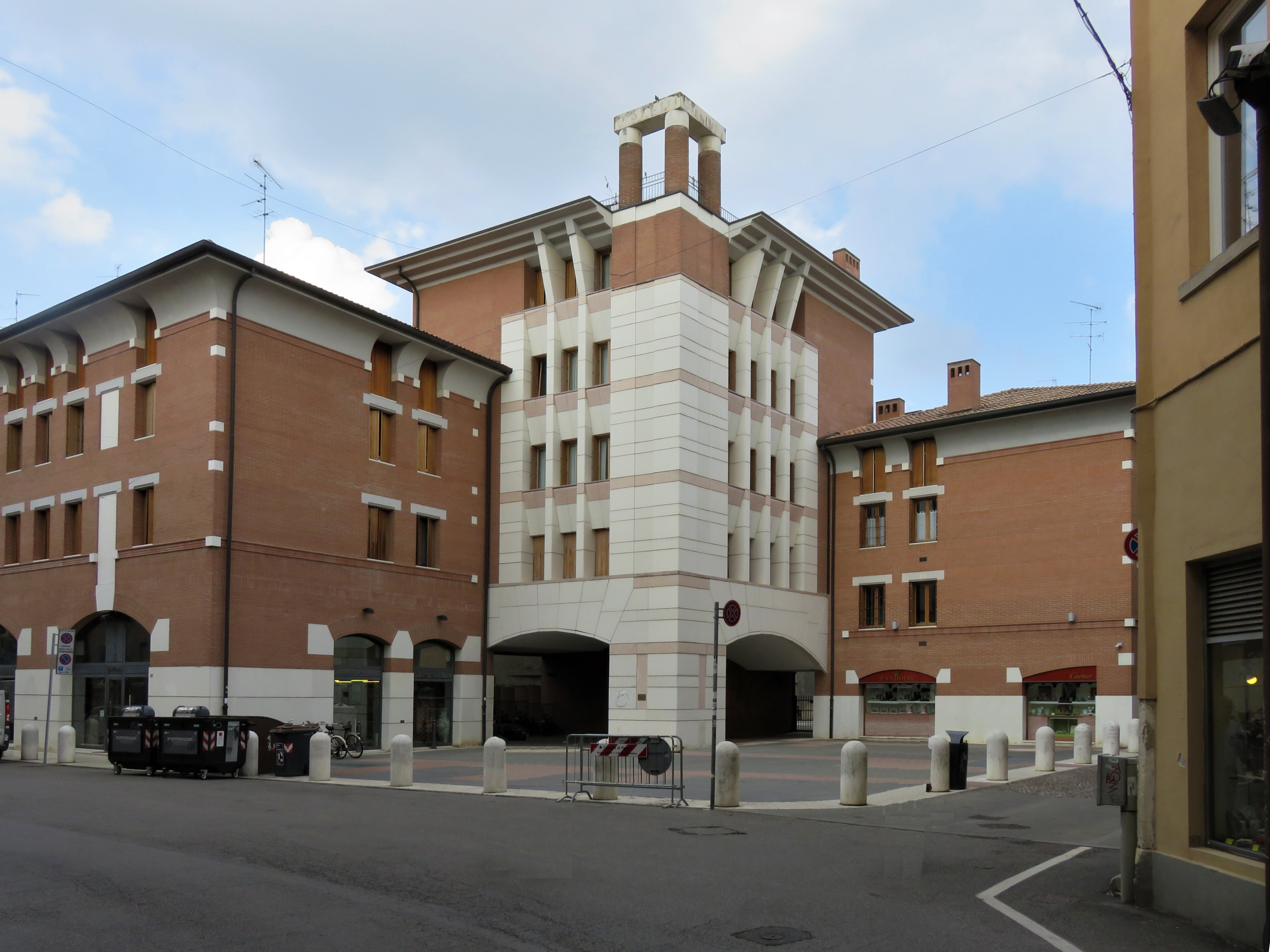 Corso Porta Reno, parte ricostruita negli anni cinquanta e successivi